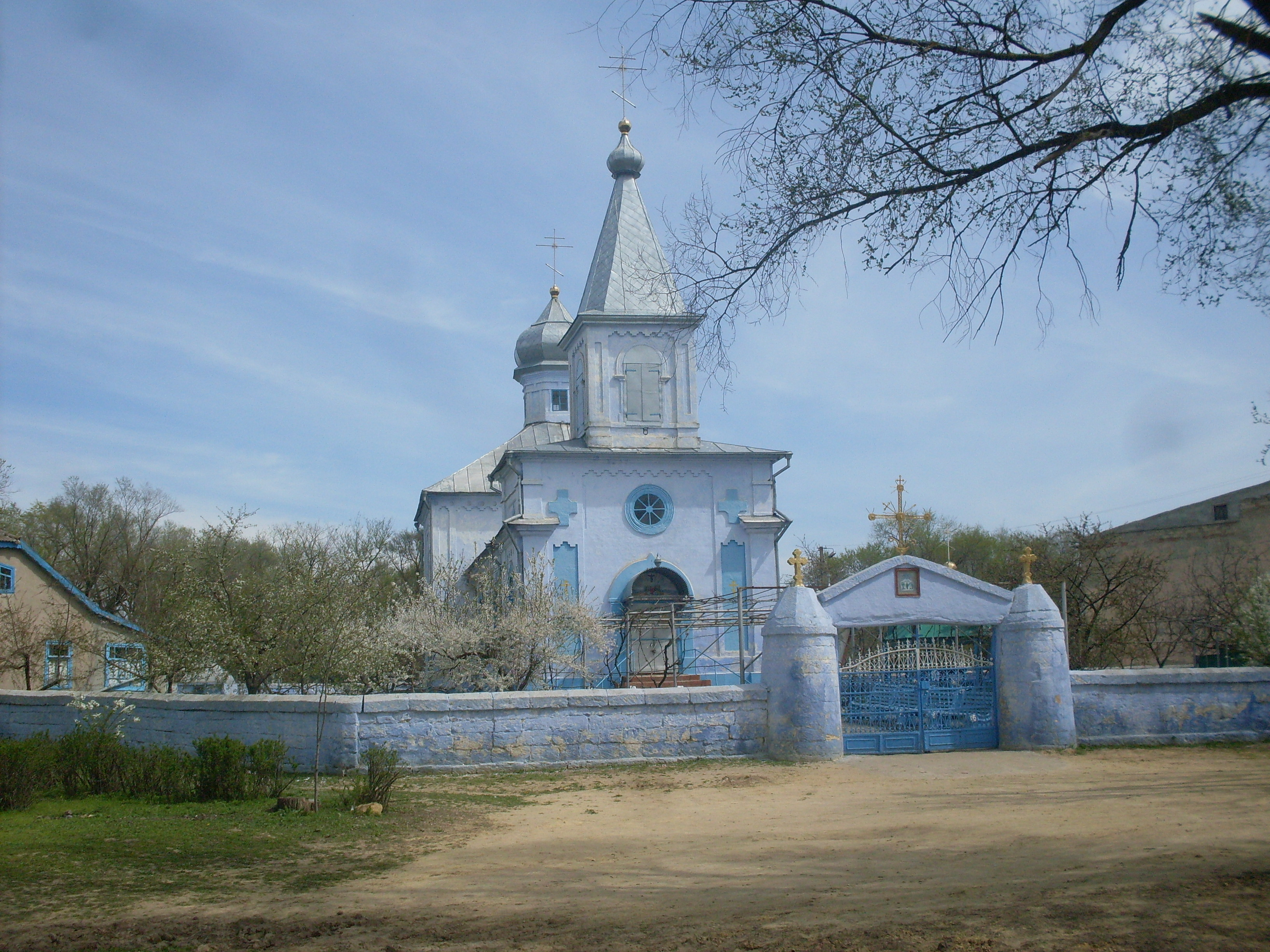 Церква Вознесіння с.. Главані,1881р